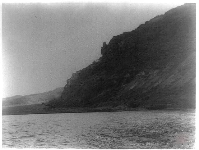 صورة ملتقطة في عام 1931 لجبل سدوم في منطقة البحر الميت في منطقة سدوم التي سخط فيها قوم لوط